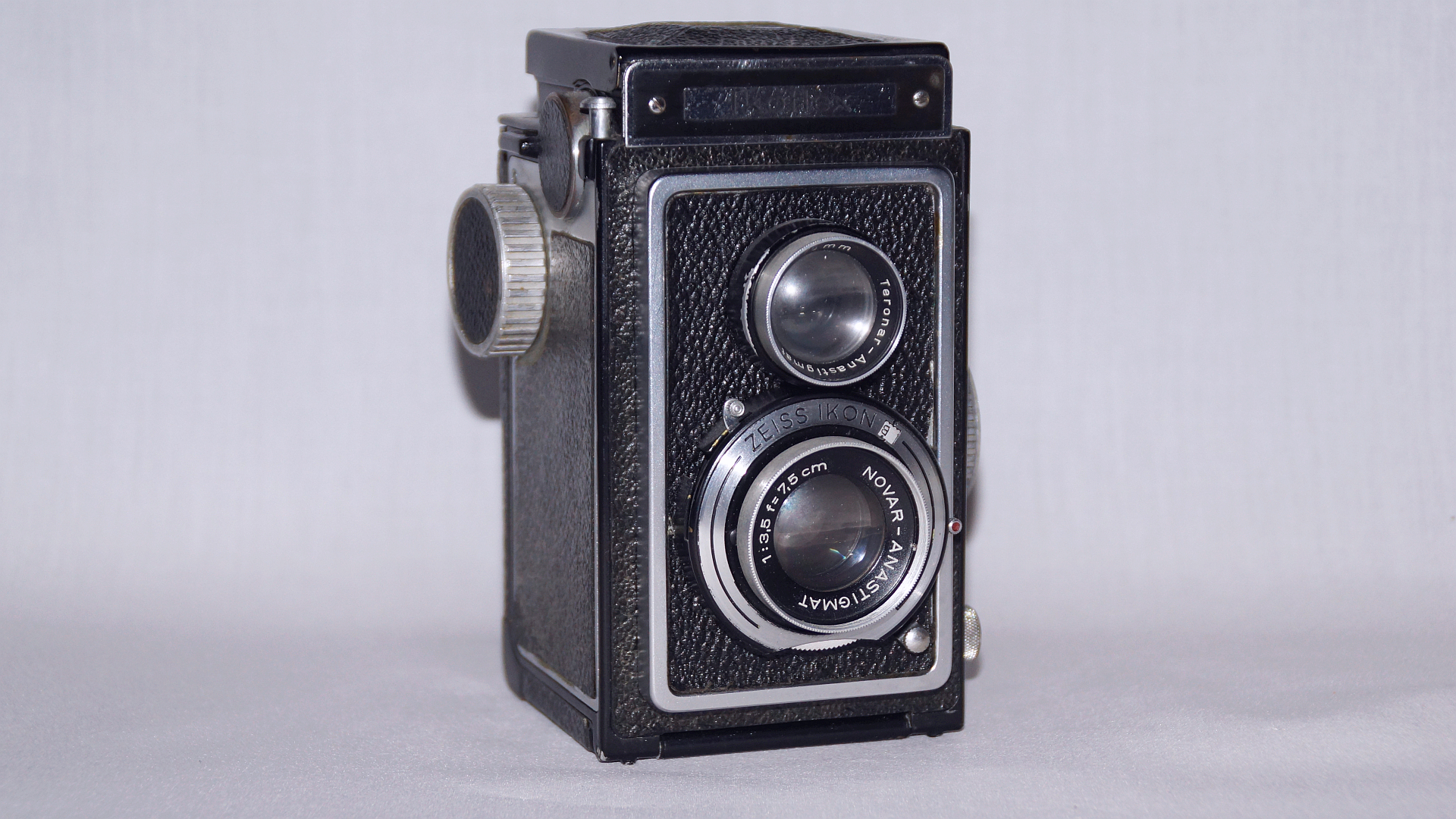 Zeiss Ikon Ikoflex mit Novar-Anastigmat 75mm 1:3.5 - Foto 2019 Wolfgang Pehlemann DSC04839